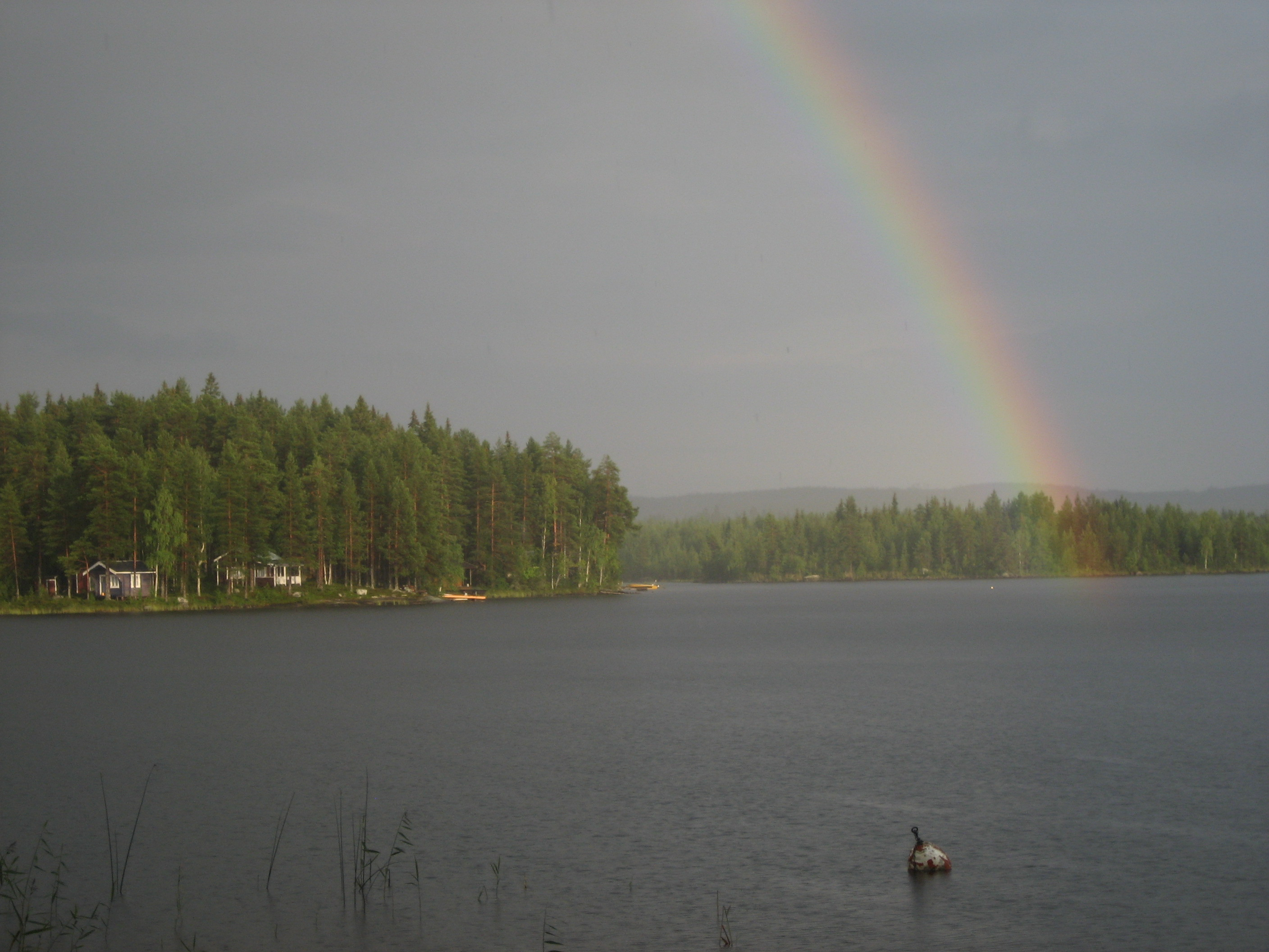 En bild över Gimsjön